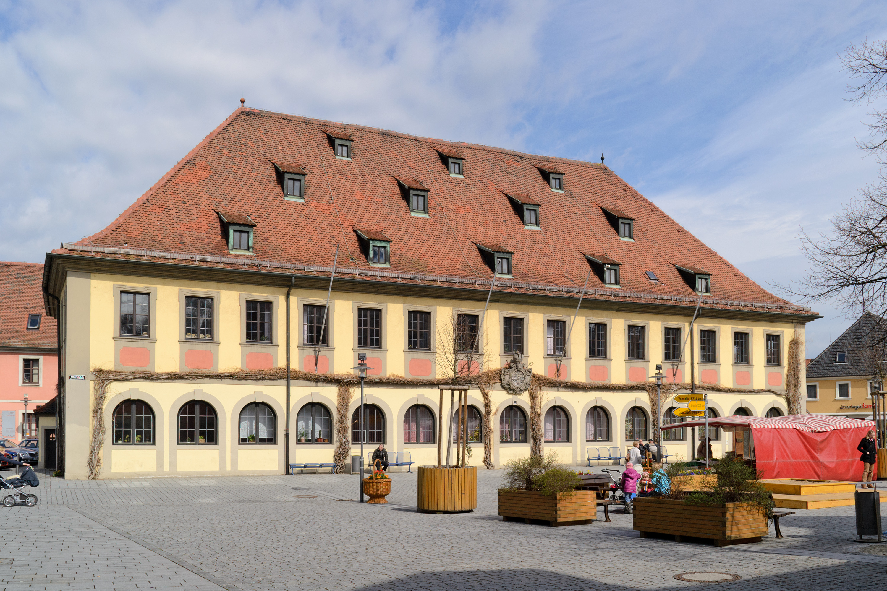 Gebäude Marktplatz 1 in Lichtenfels, Rathaus